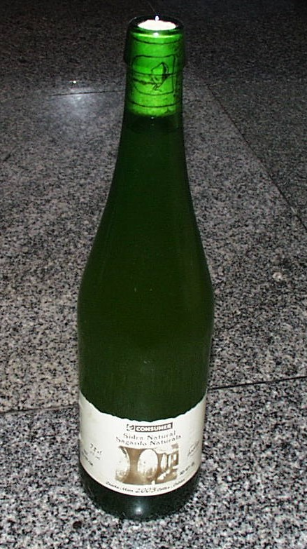 Euskal sagardo botila